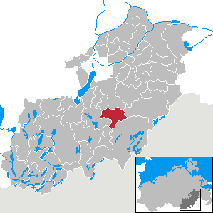 Möllenbeck in Mecklenburg-Vorpommern, Landkreis Mecklenburg-Strelitz